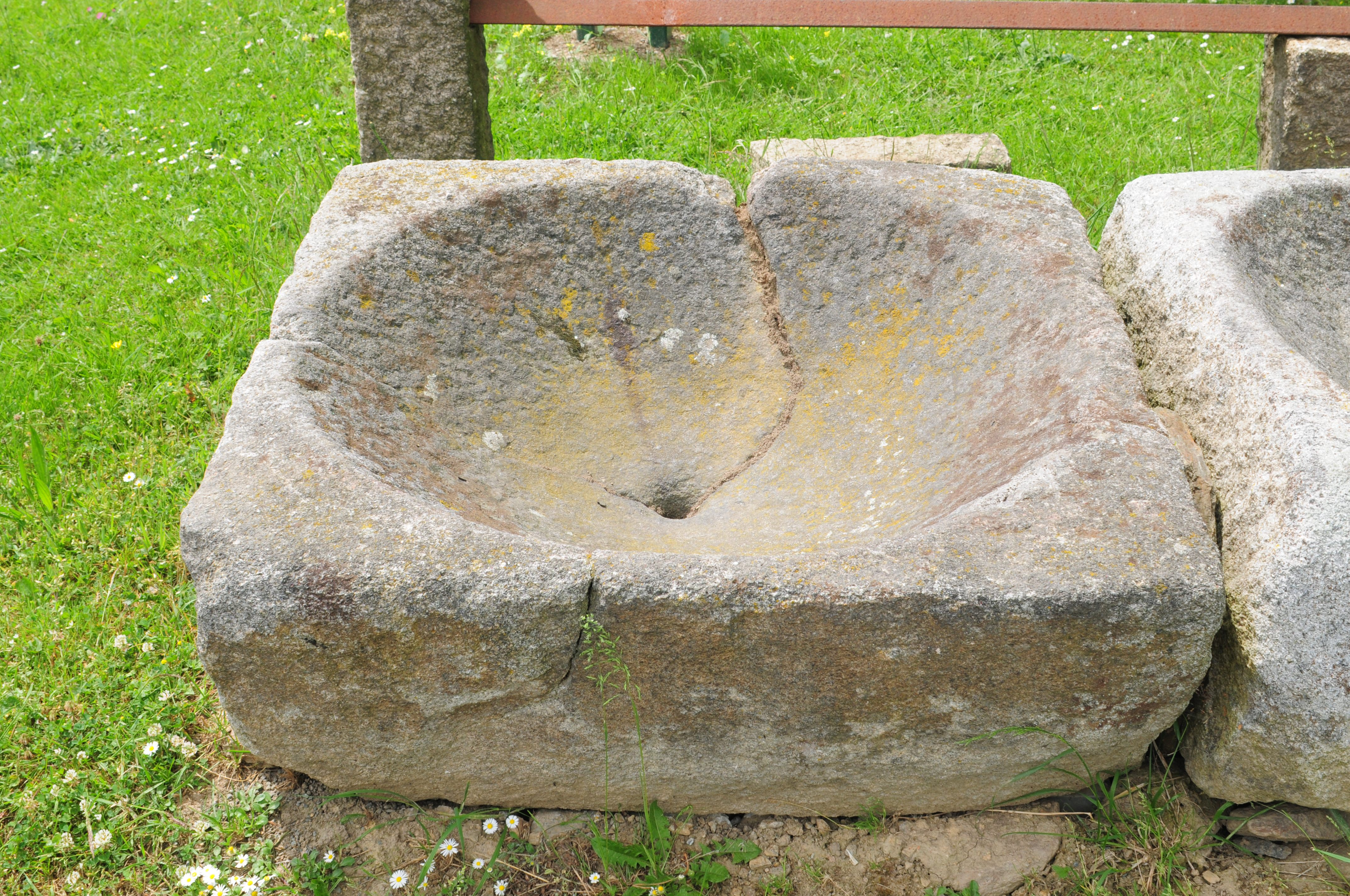 Auerbach/Vogtl., Ortsteil Reumtengrün, Griebenherd aus Granit (Vogtlandkreis, Freistaat Sachsen, Deutschland)